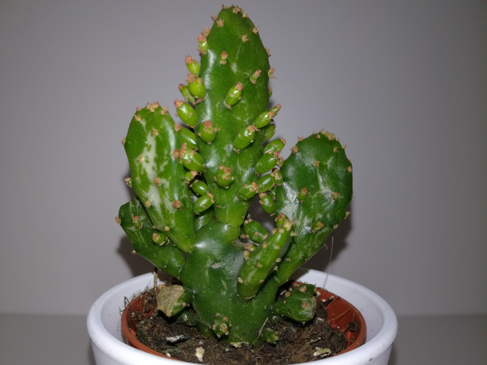 Petit Opuntia monacantha